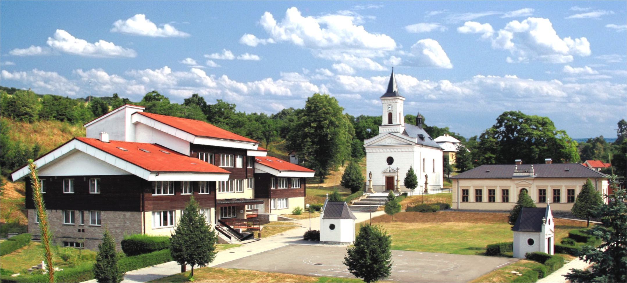 centrum